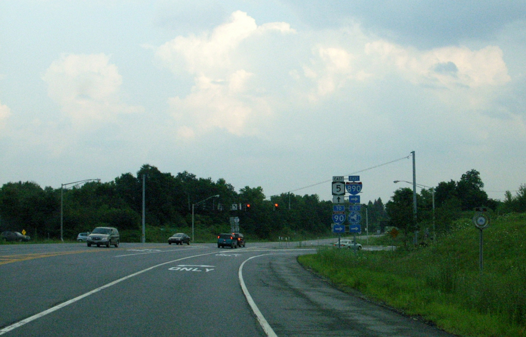 NY 5-NY 890 junction